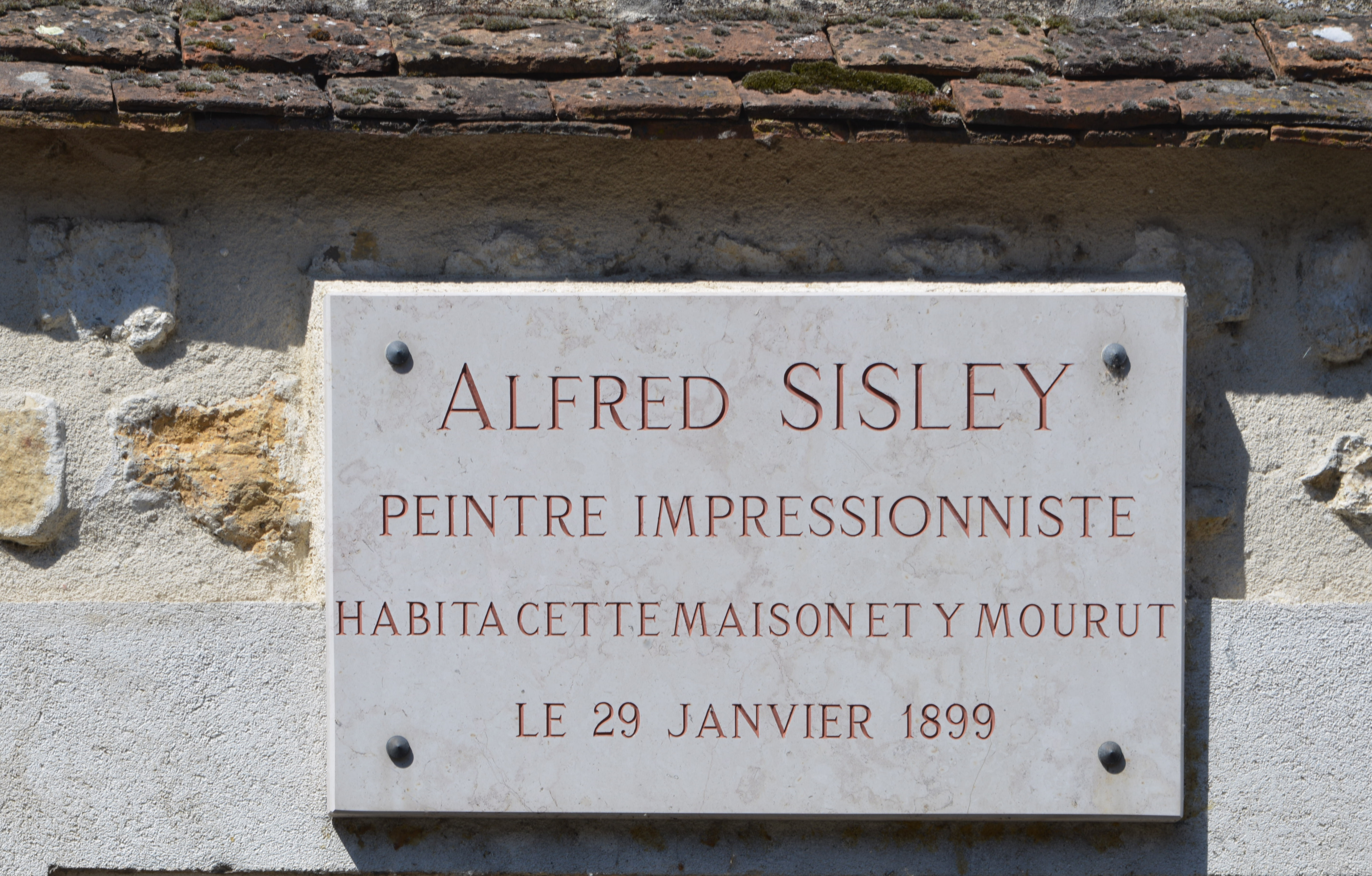 Plaque maison Alfred SISLEY à Moret-sur-Loing